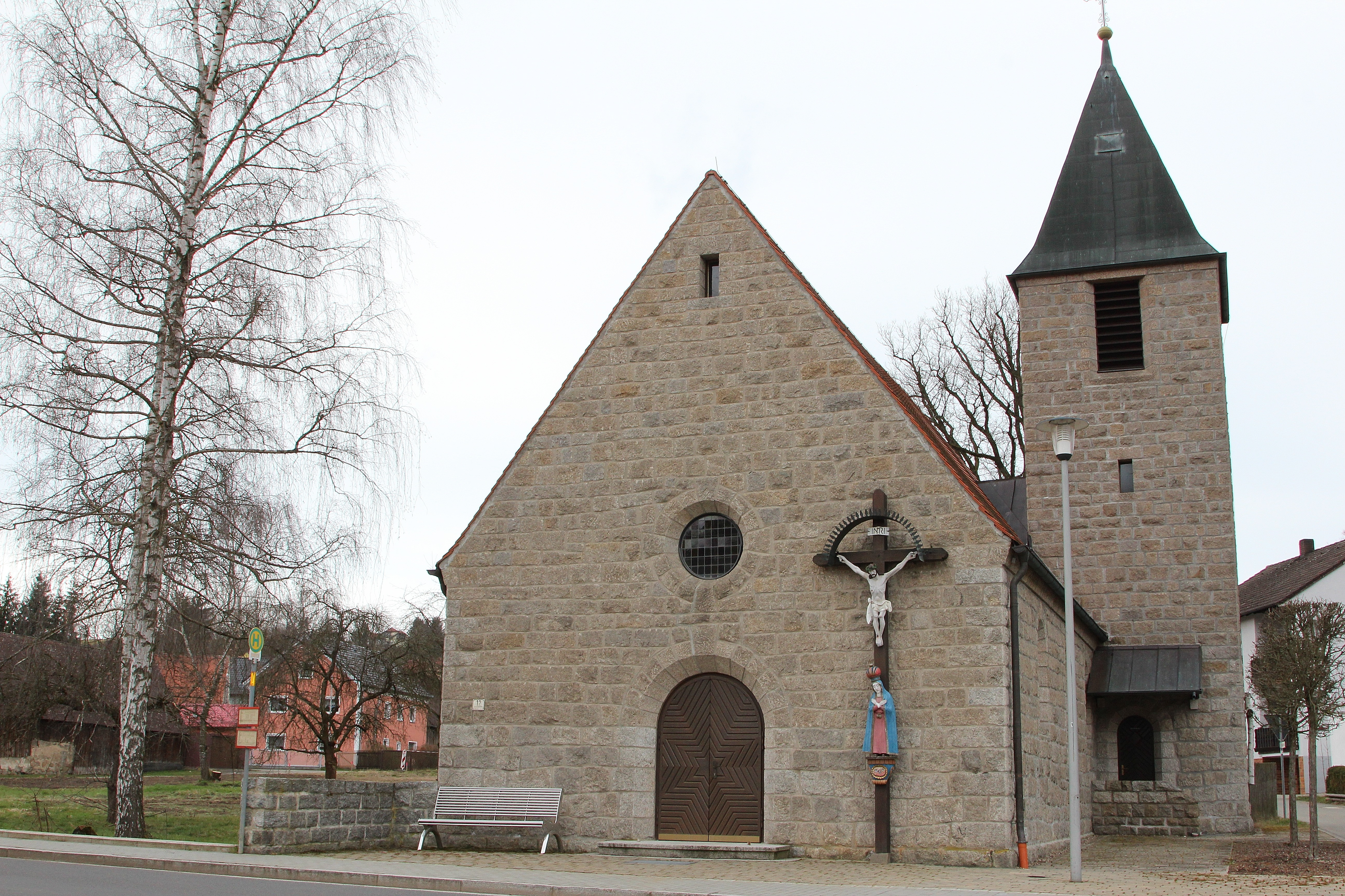 Kaimling, Kirche zur Ehre der Unbefleckten Empfängnis, 1952 geweiht; Stadt Vohenstrauß, Landkreis Neustadt an der Waldnaab, Oberpfalz, Bayern